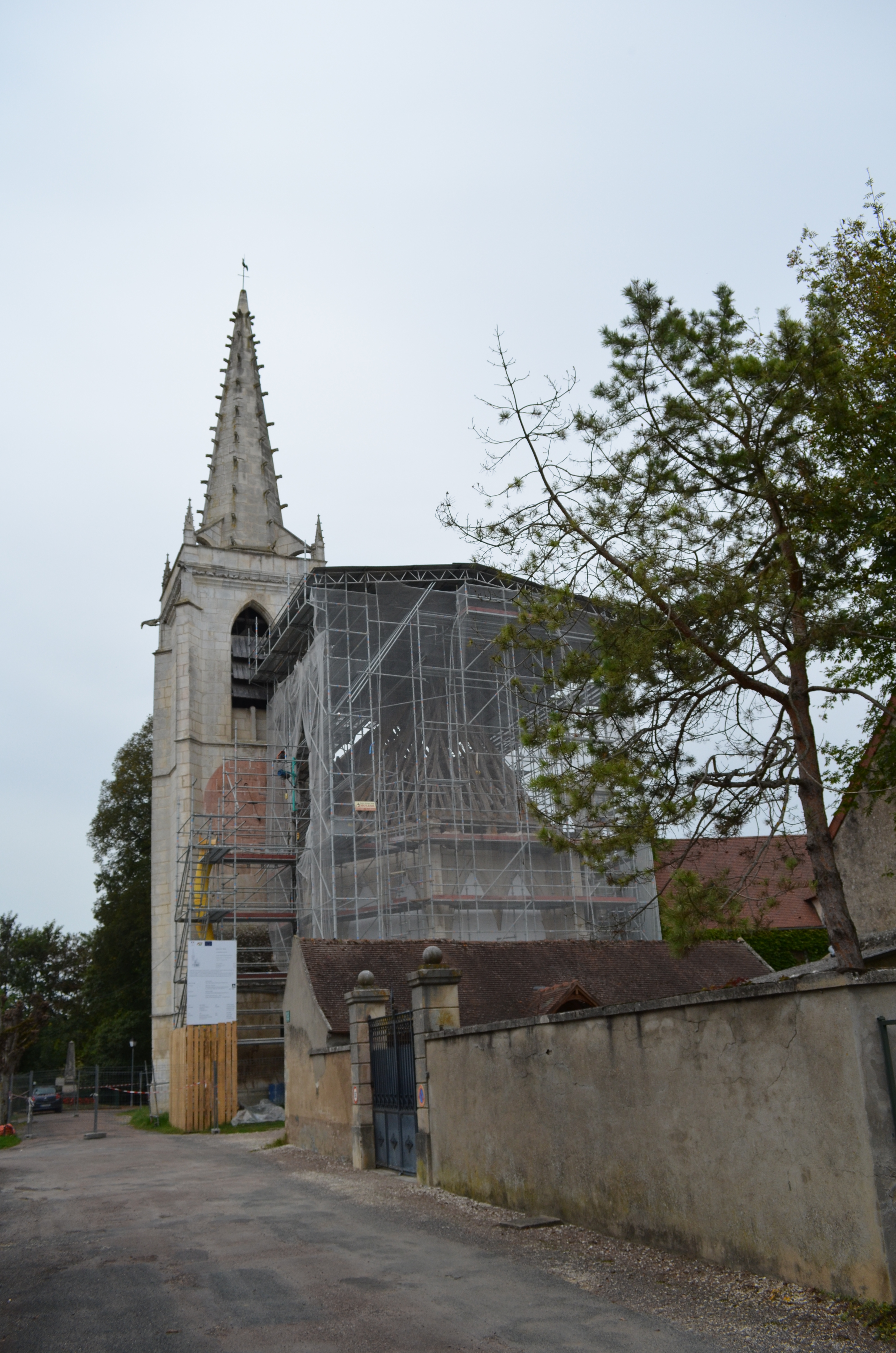 Église Saint-Martin de Surgy. .